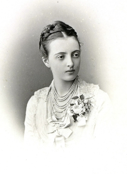 Anastasia Michailowna Romanowa um 1880